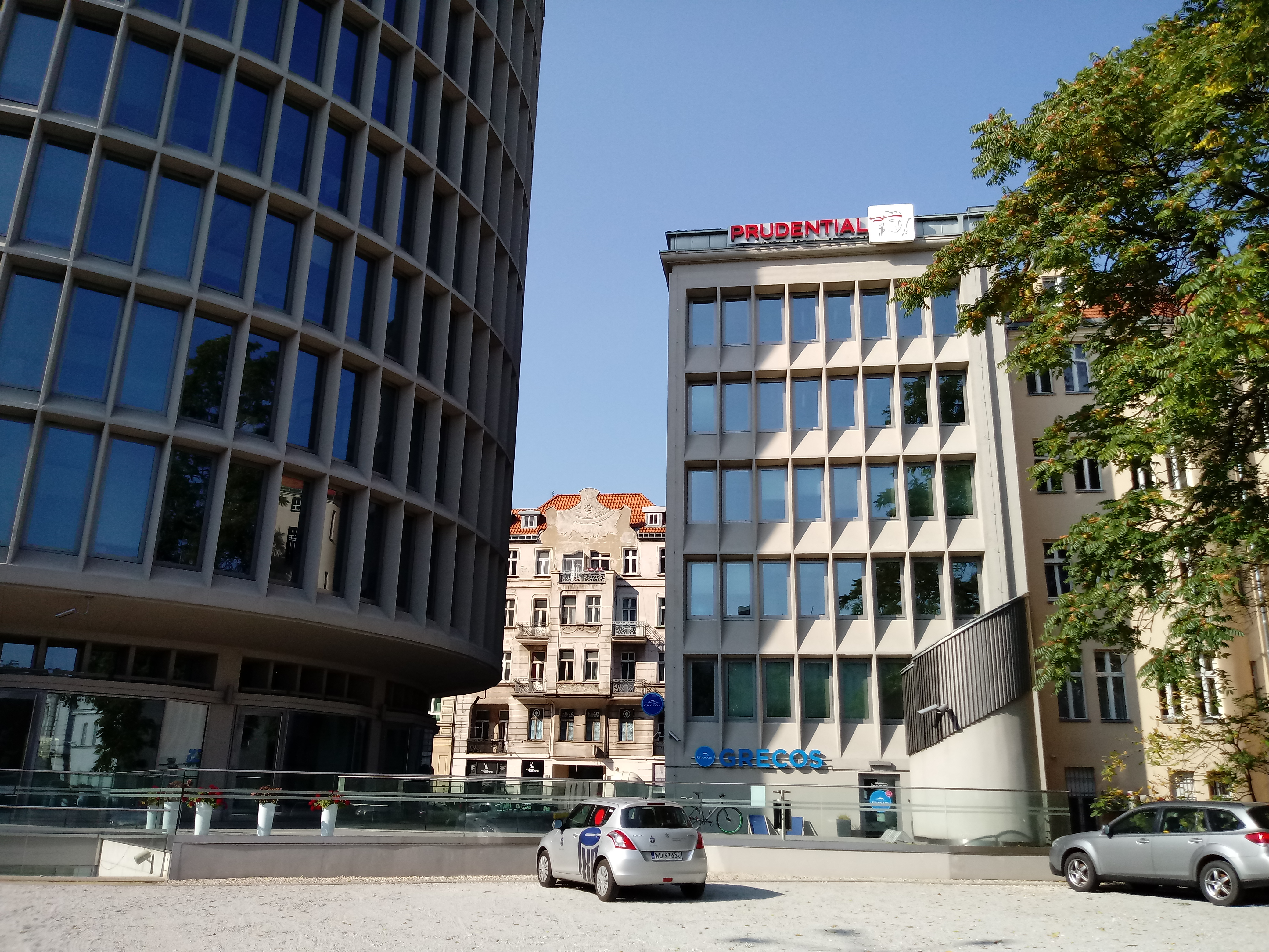 tzw. Kwadraciak przy Okrąglaku w Poznaniu